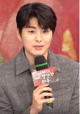 MBC 새 수목드라마 '어쩌다 발견한 하루'는 상큼한 비주얼과 다정한 성격, 겉으로 보기에는 모자랄 것